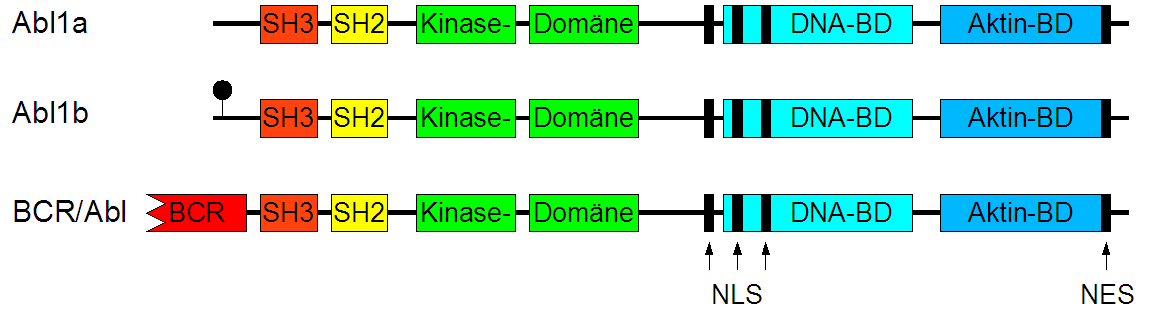 Strukturelle Organisation von c-Abl. (BD: Bindungsdomäne, NLS: Kernlokalisierungssignal, NES: Kernexportsignal)